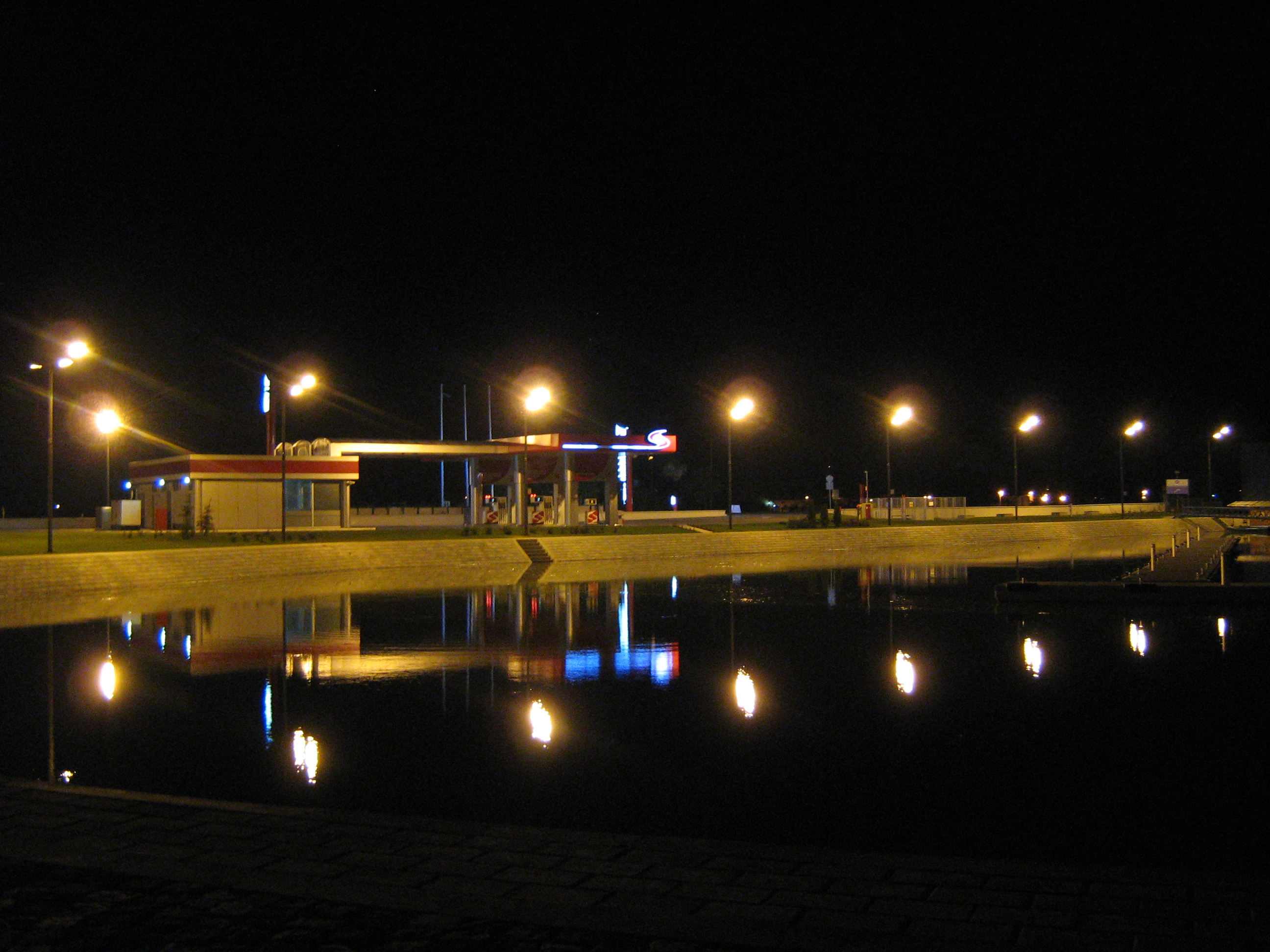 Аутор: Пајкмен